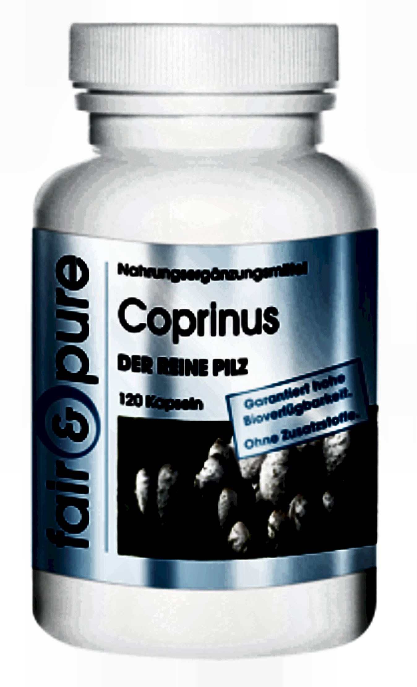 Coprinuskapseln